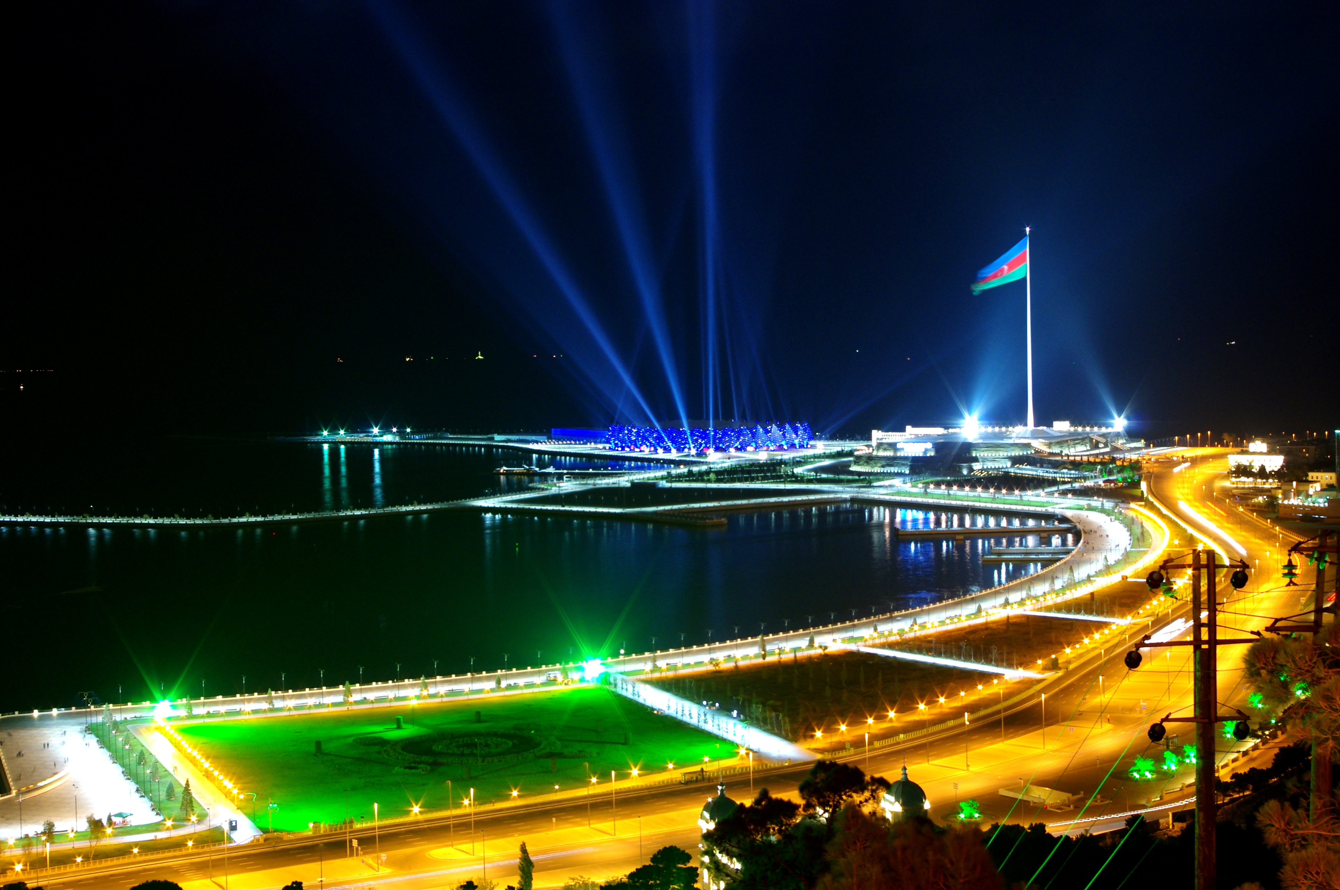 Кристалл-холл. Нац. флаг (высота флагштока 162 метра, размер флага 70х35 метра)